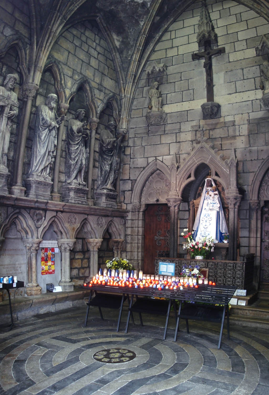 Chapelle de la Vierge - Basilique de Guingamp (France).